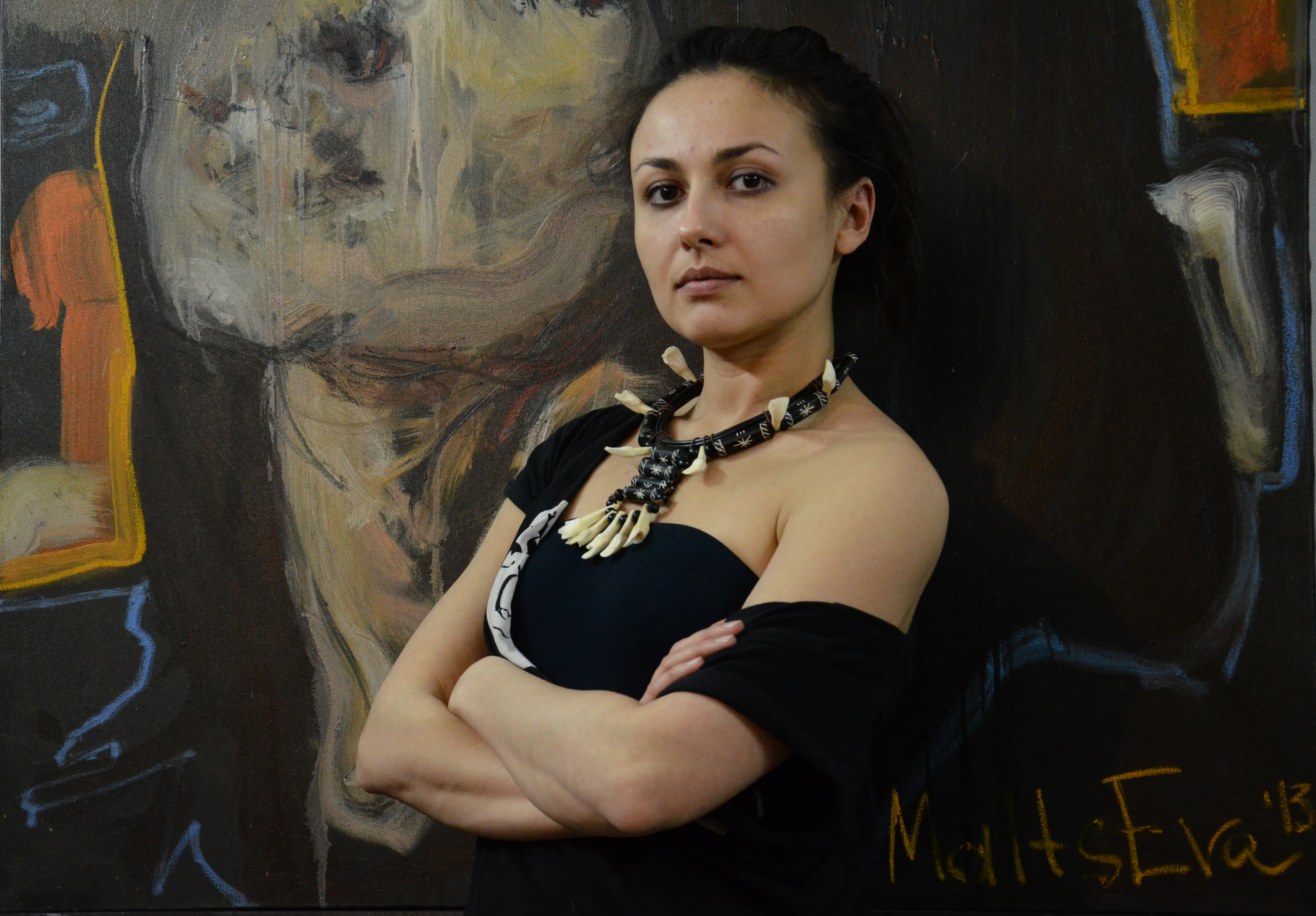 на фоне своей картины